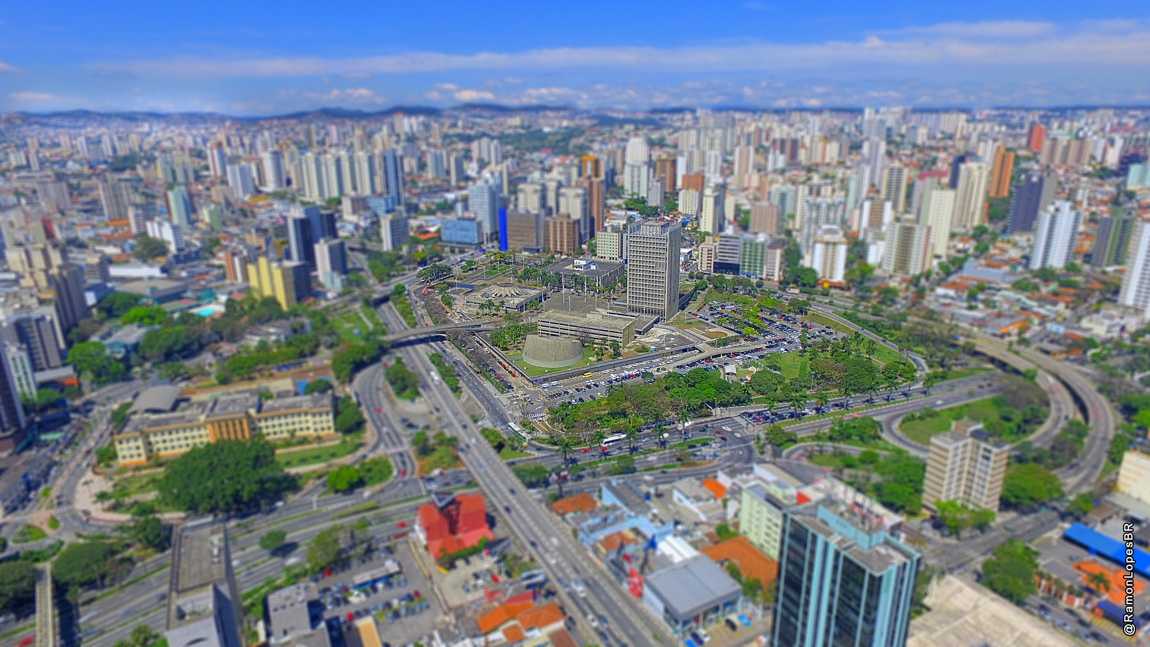 Paço Municipal De Santo André Visto de Cima.